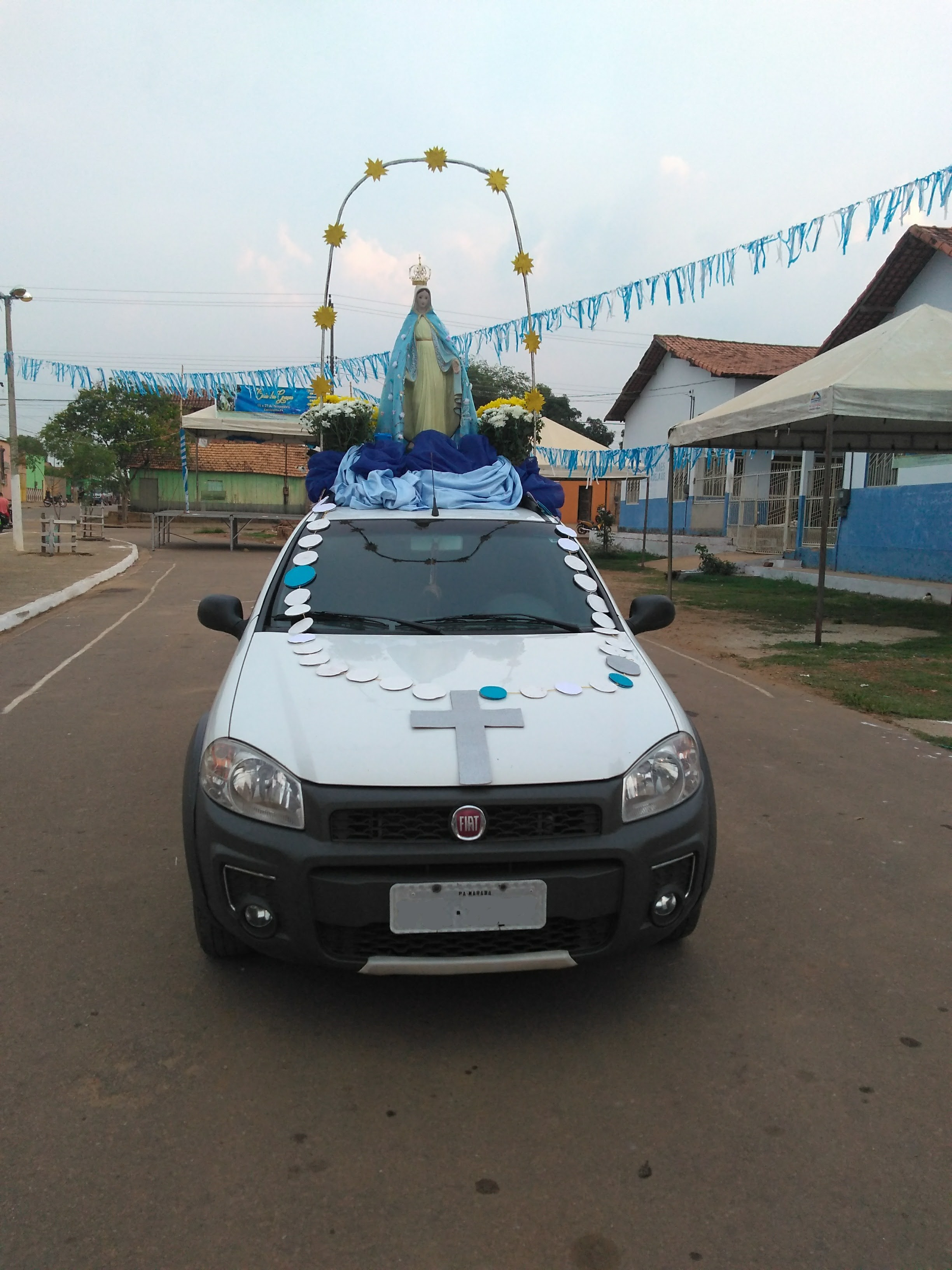 Imagem de Nossa Senhora das Graças, num Fiat Strada, em Curionópolis.